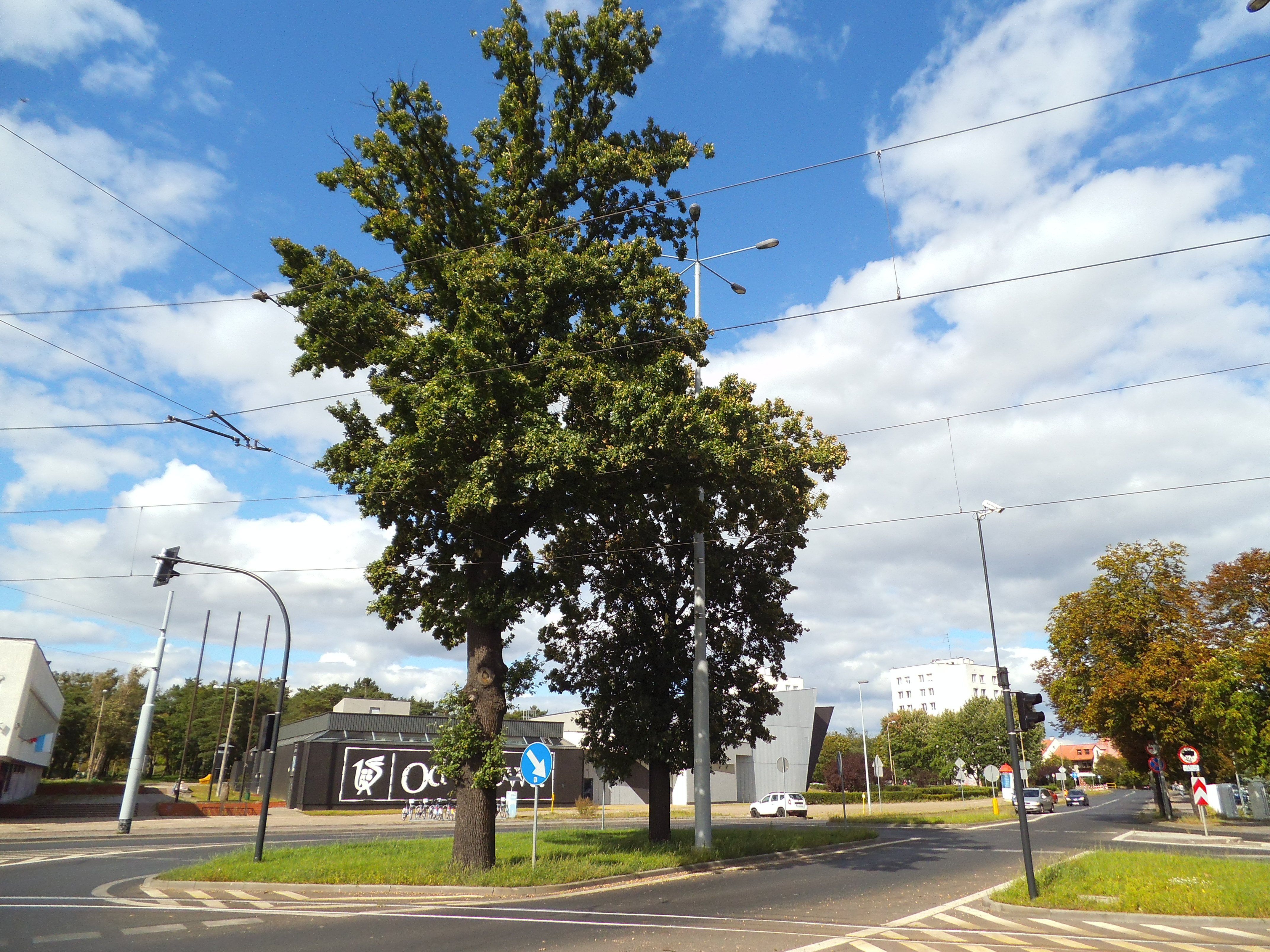 Pl. ks. Frelichowskiego, Toruń2